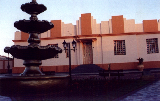 Uma foto do museu Cornélio Ramos, em Catalão, Goiás